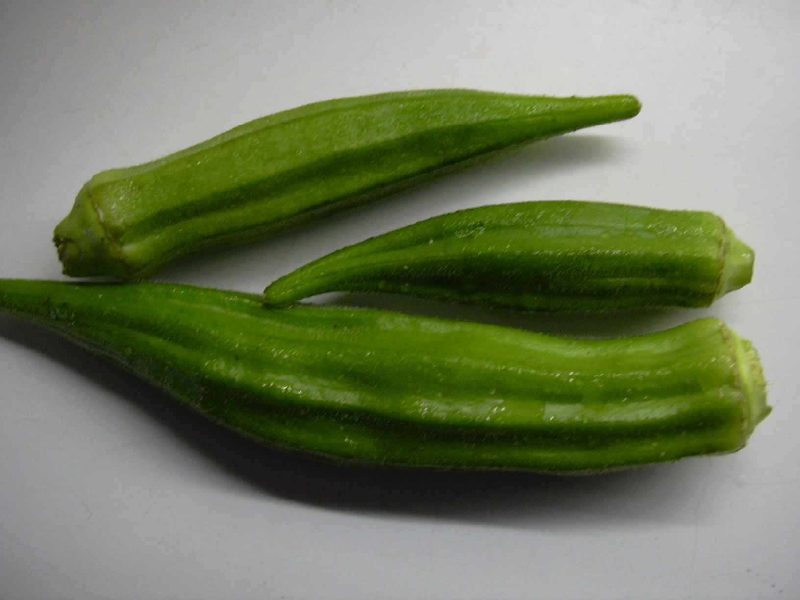 Okra fruits